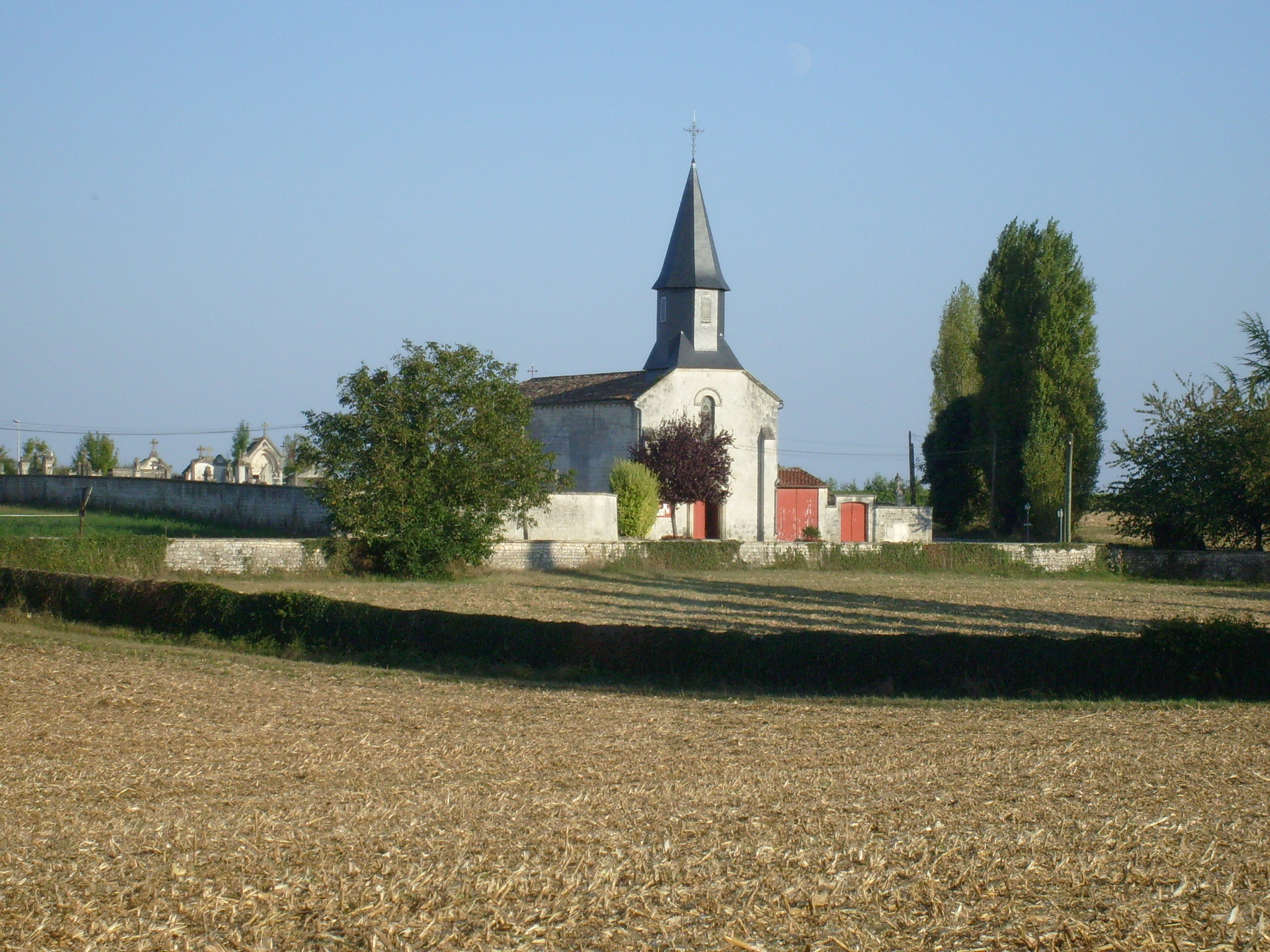 Le village de Balanzac